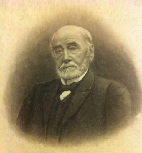 Extrait du souvenir pieux de Joseph de Hemptinne